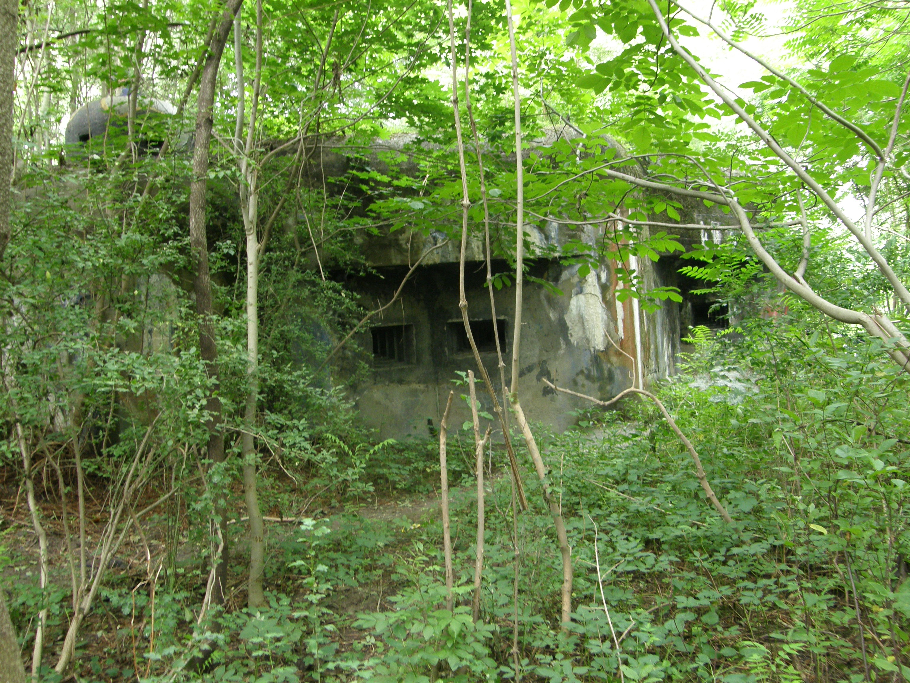 Pěchotní srub B-S 1 Štěrkoviště (Bratislava)